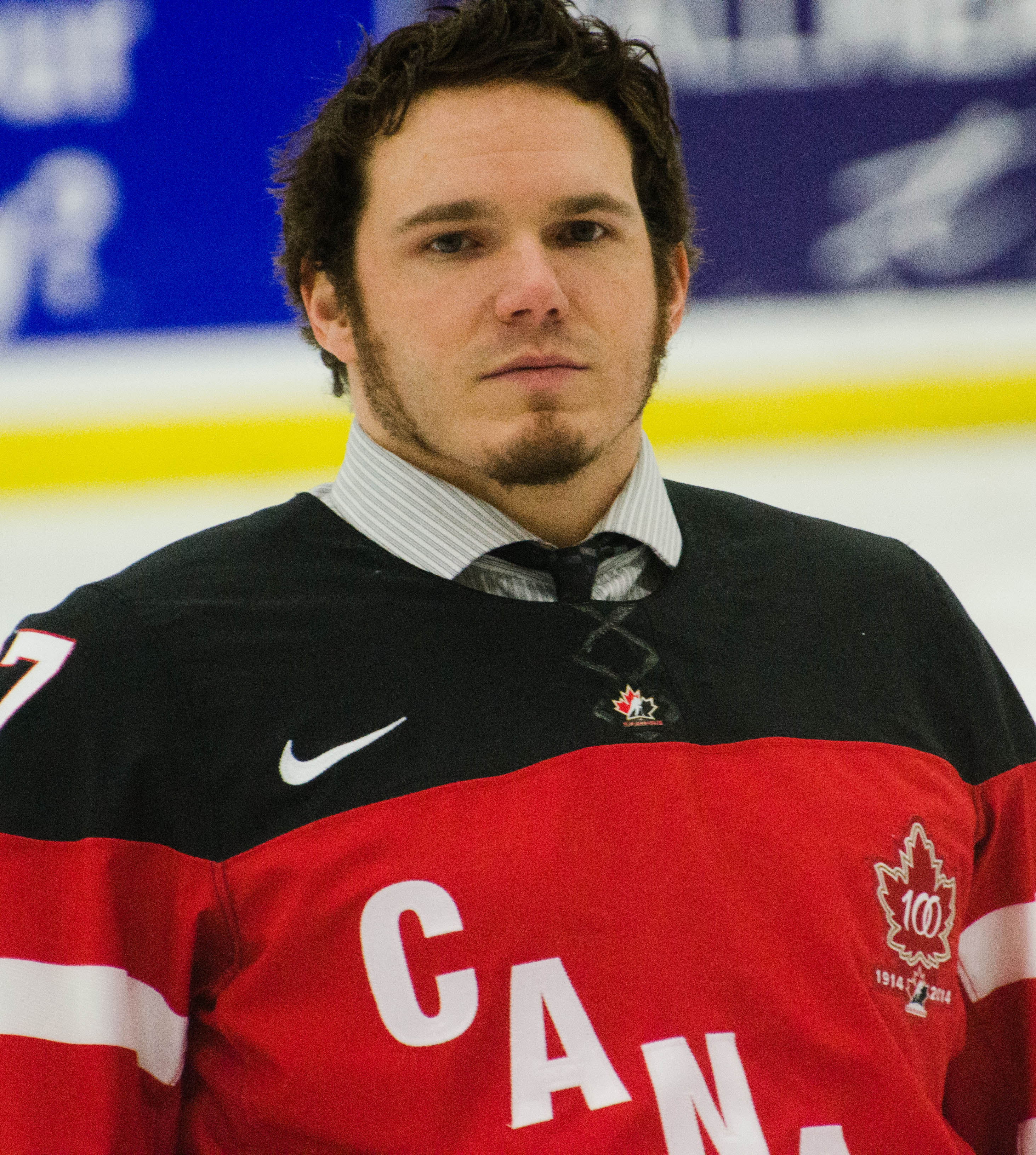 Brad Bowden, 2015